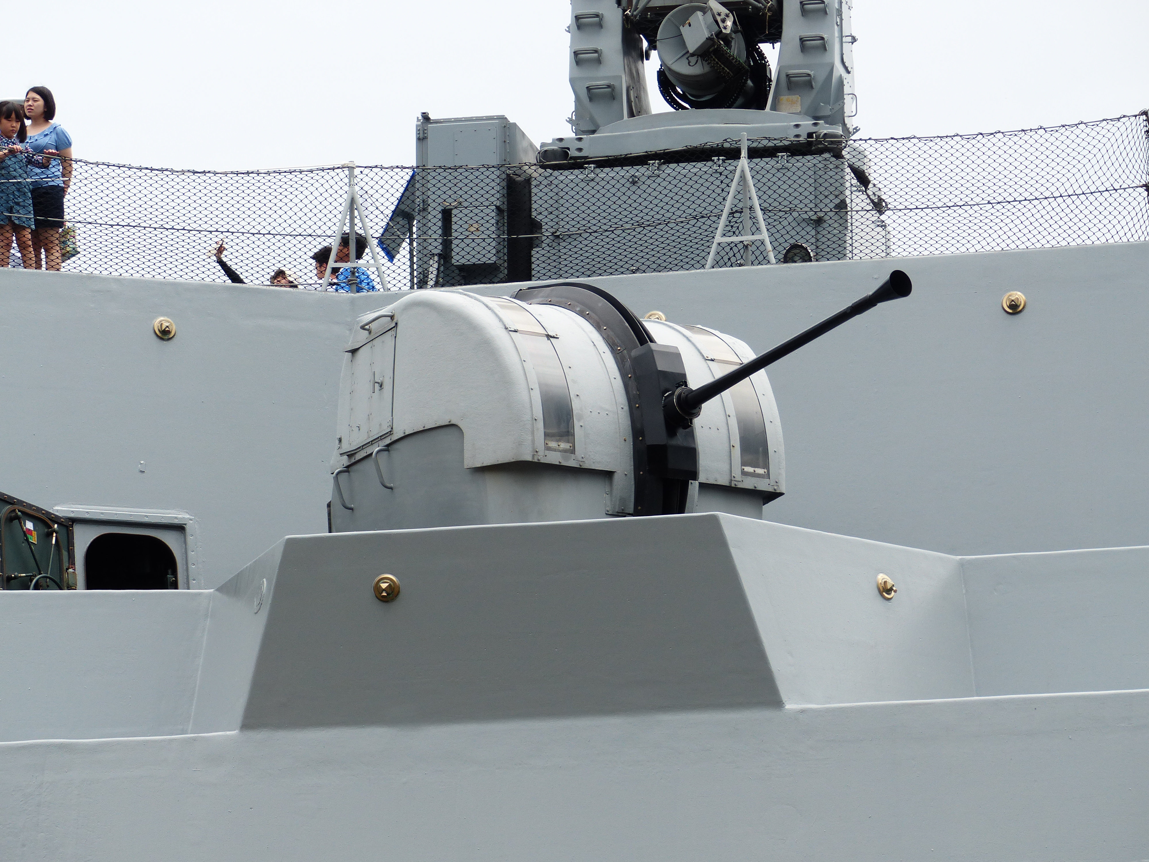 巡防艦武昌（PFG-1207）左舷指向左斜後方的波佛斯40mm L/70機關砲，上方是Mk15方陣快砲尾部，攝於2013年中正軍港營區開放活動。